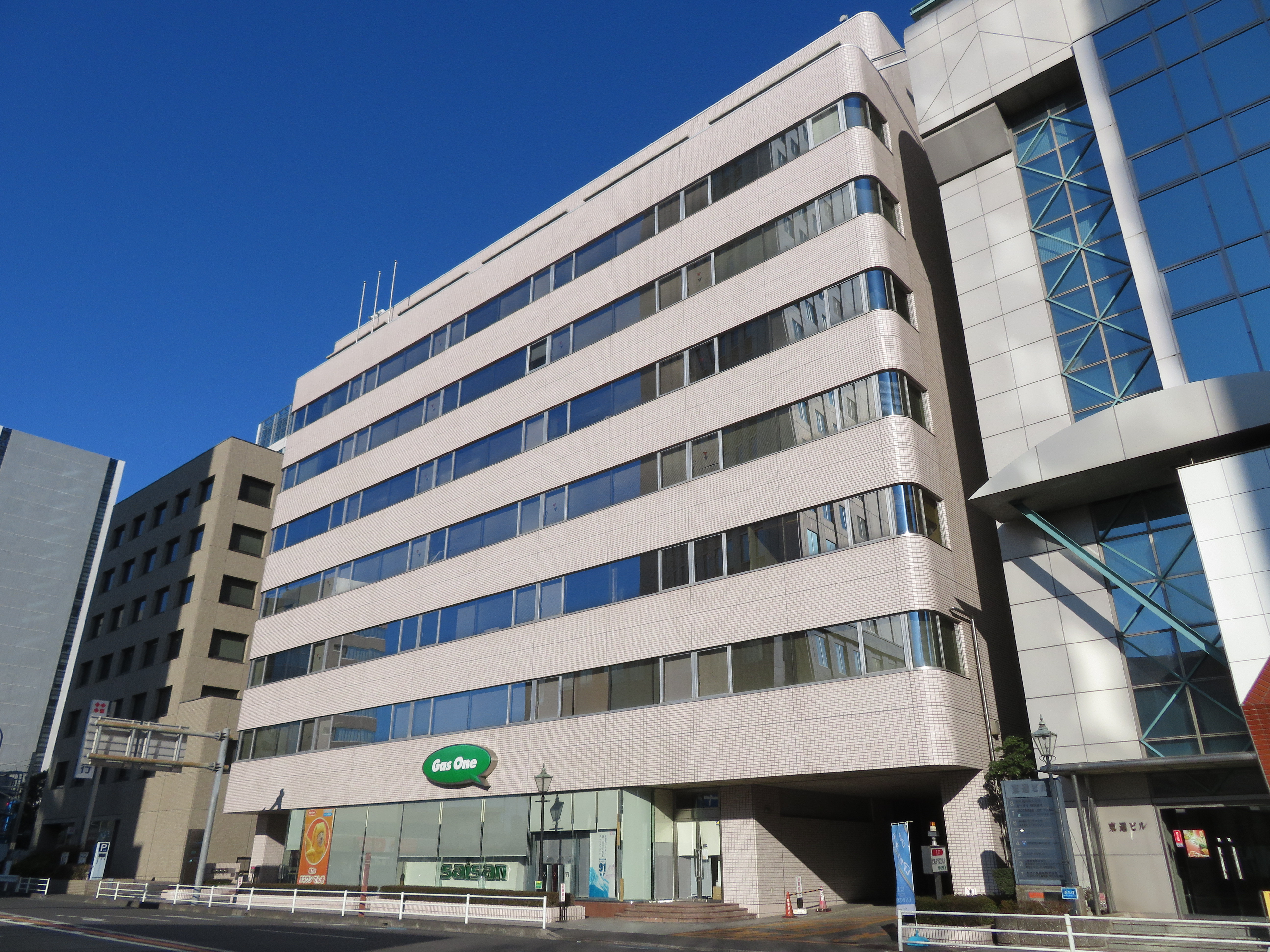 埼玉県さいたま市大宮区に所在するサイサン本社 Canon PowerShot SX720 HS